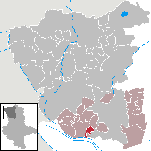 (Original text: Sachau im Landkreis Salzwedel)